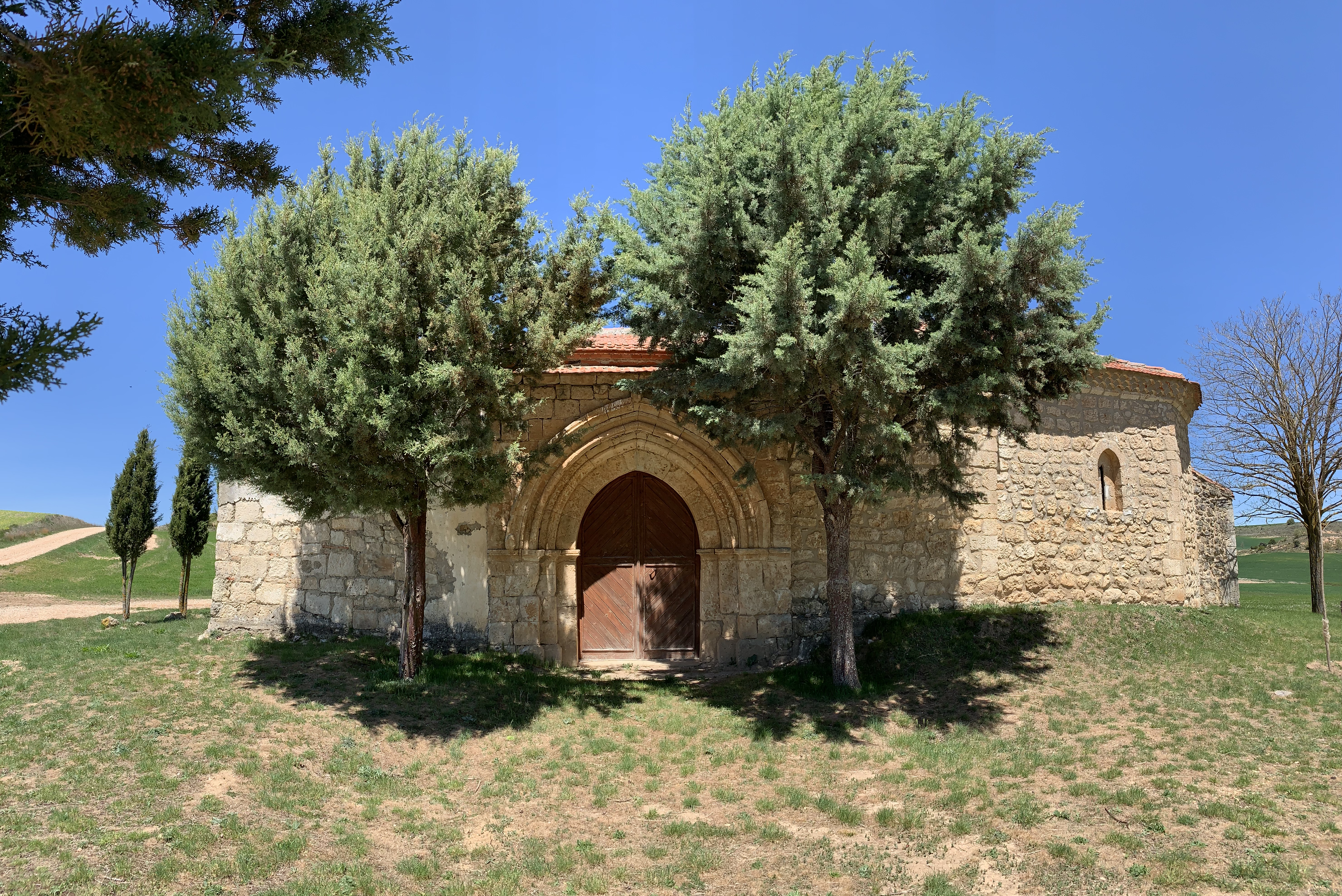 Ermita de San Marcos y Quintanilla de los Caballeros